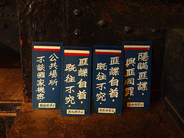 在台灣過去年代，大街小巷常見的保密防諜標語。此為台東糖廠的保密防諜標語牌。匪諜